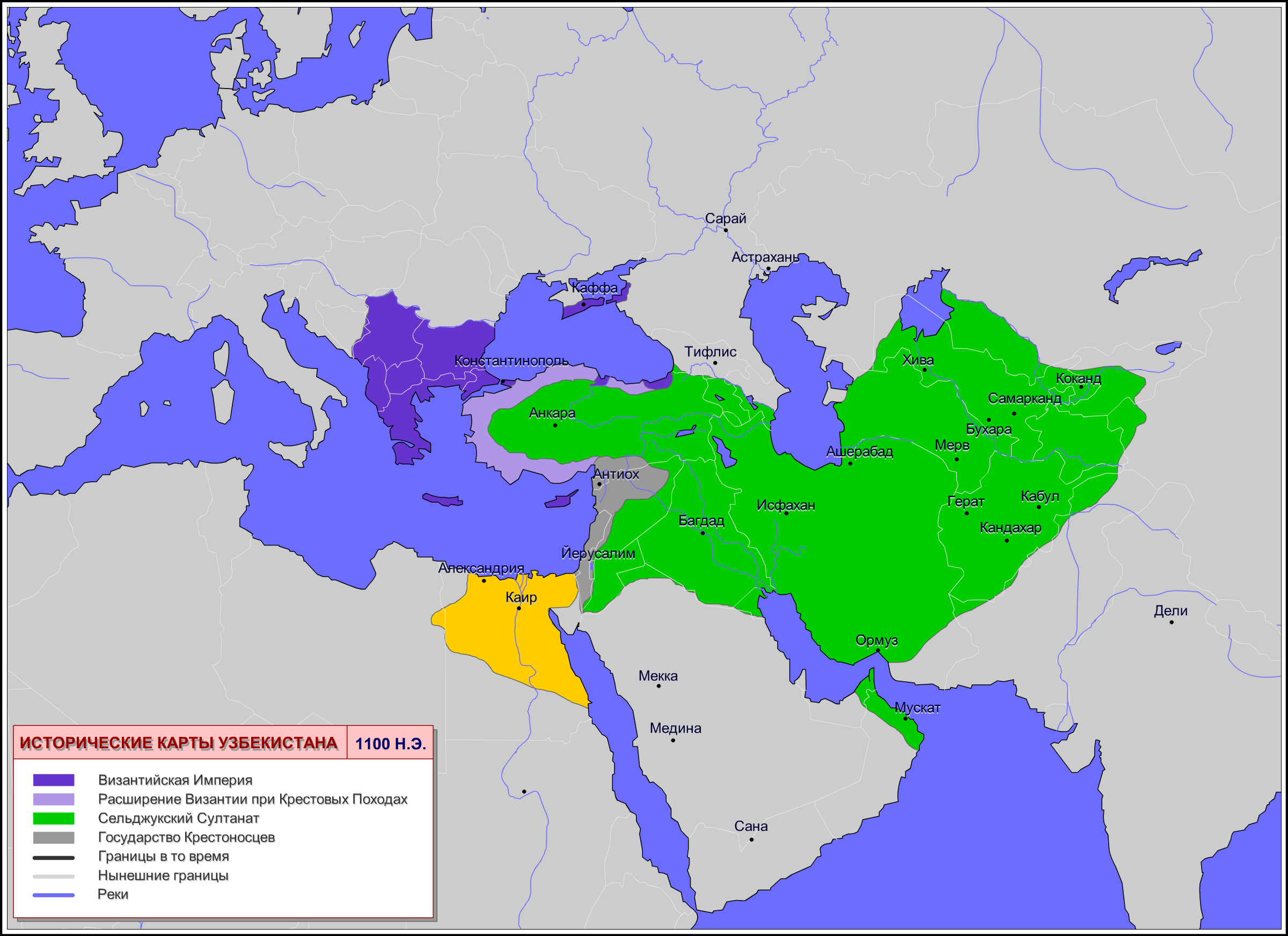 Карты Узбекистана. История 1100 год